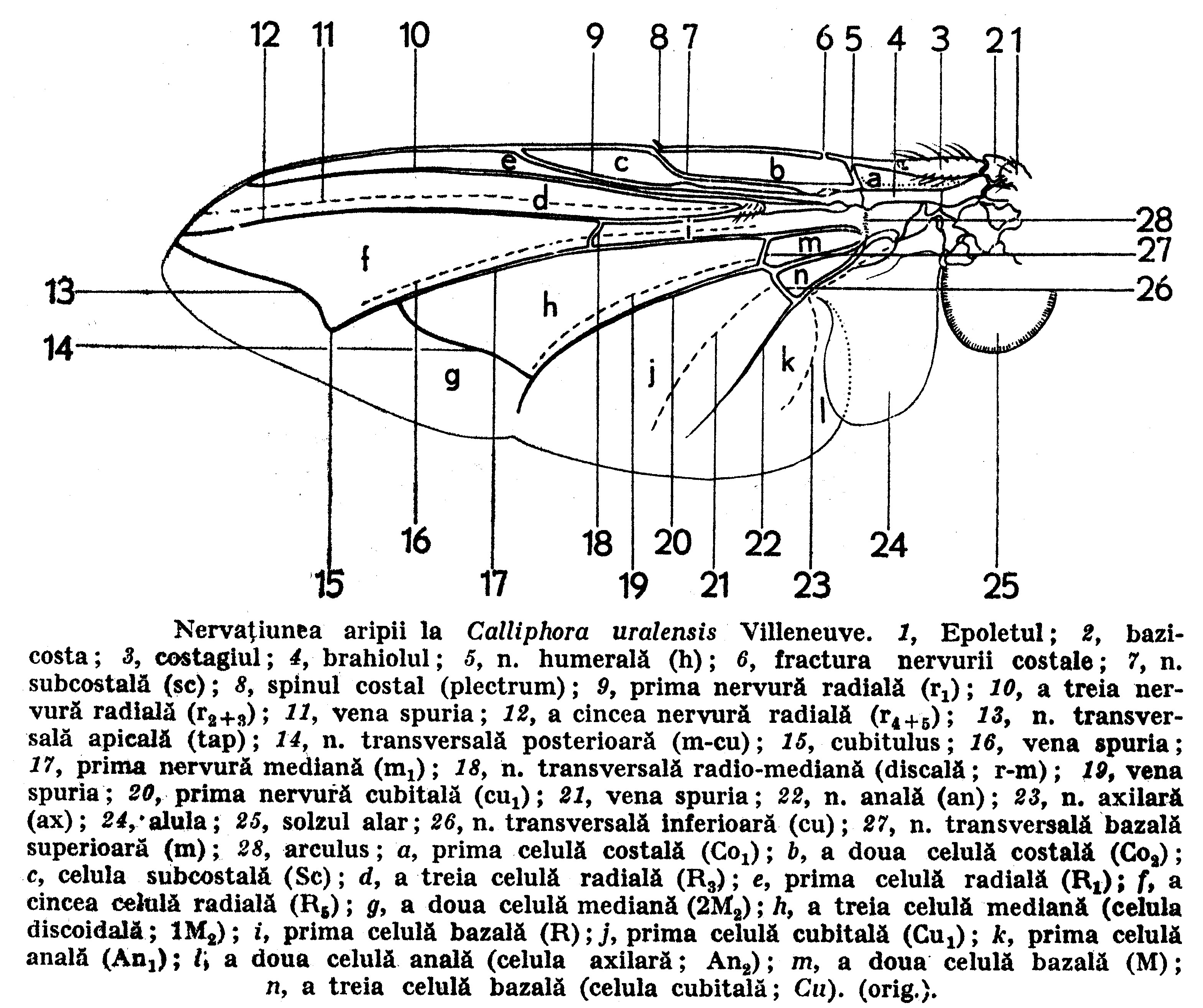 Nervaṭiunea aripii la Calliphora